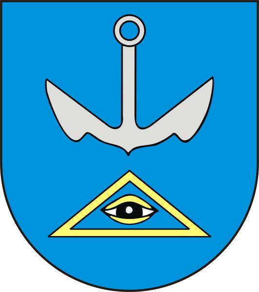 Herb Skrzyszowa